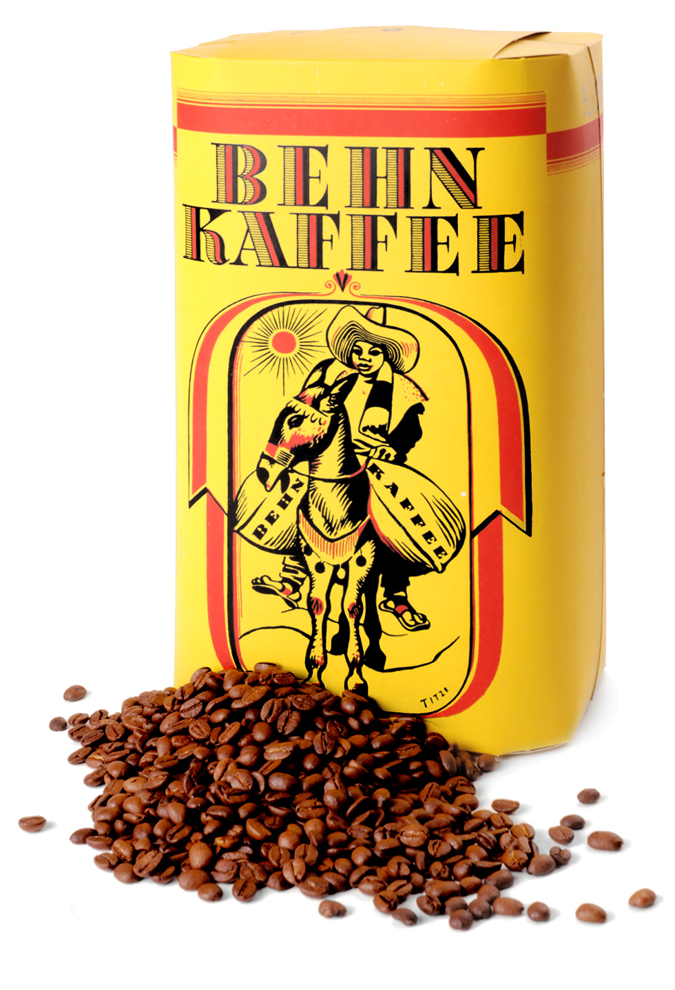 Kaffee Verpackung der Rösterei Behn & Sohn